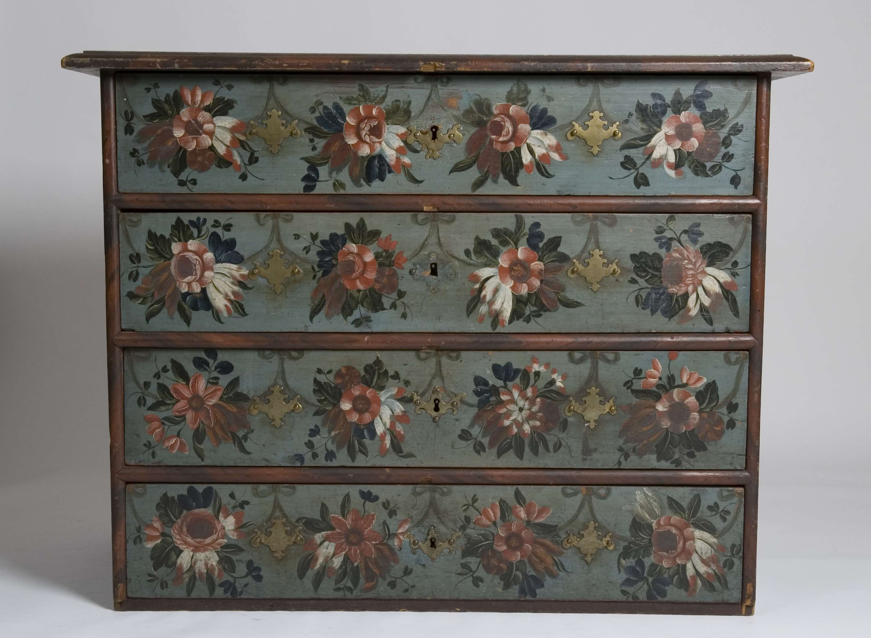 Dragkiste malt av Peder Aadnes omring 1760-1790. Innkommet til Norsk Folkemuseum fra Gausdal i Oppland. Foto: Anne_Lise Reinsfelt, Norsk Folkemuseum, NF.1896-0632.